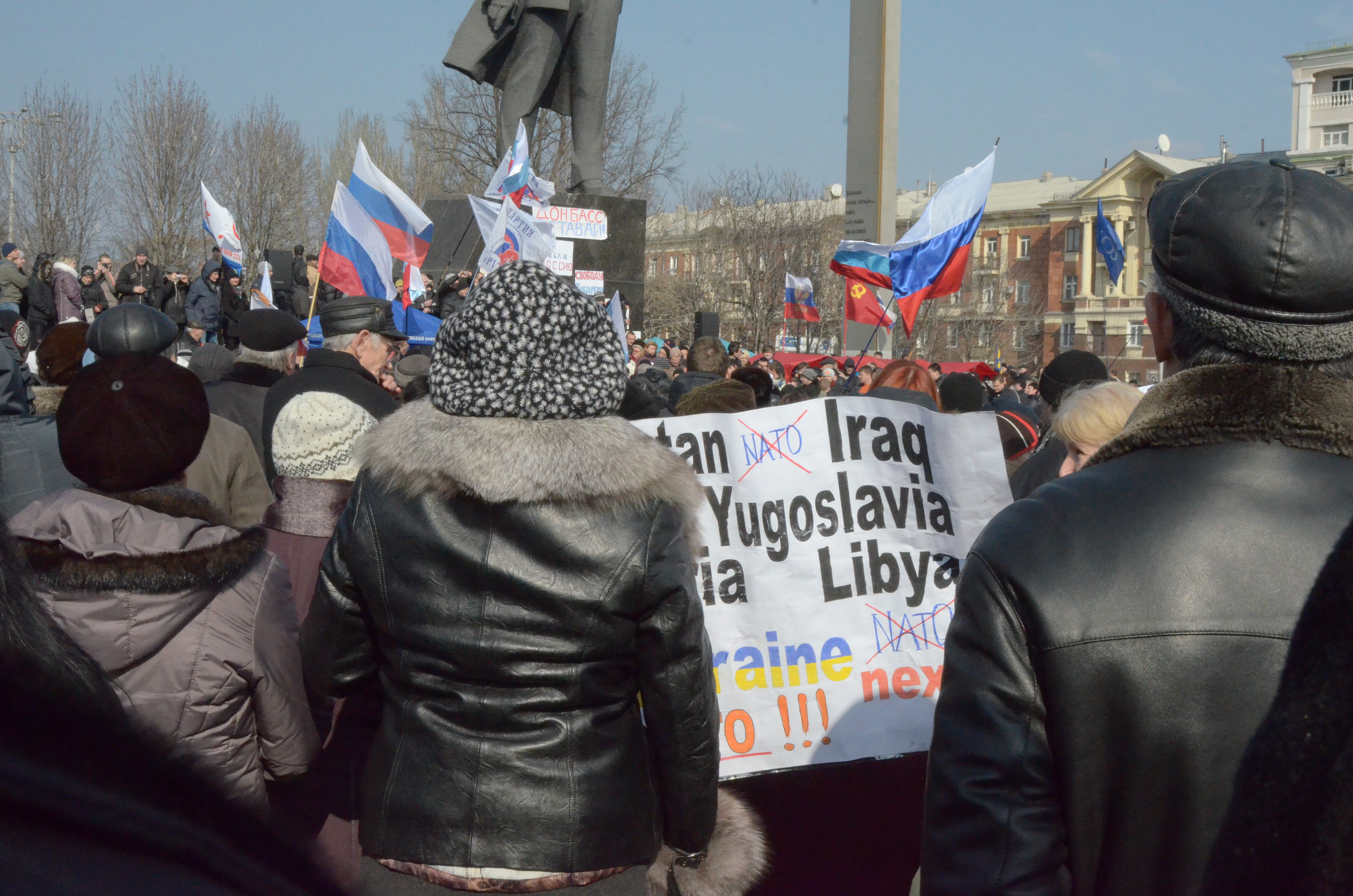 Протесты в Донецке